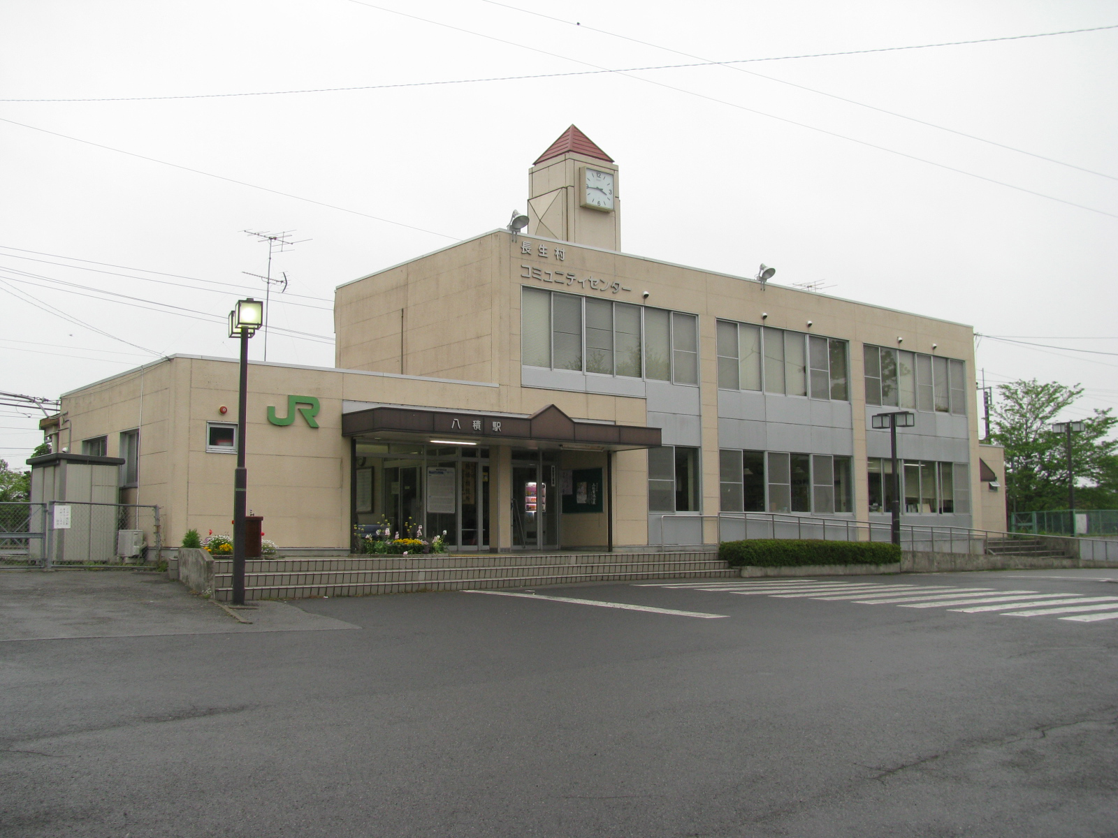 東日本旅客鉄道外房線八積駅